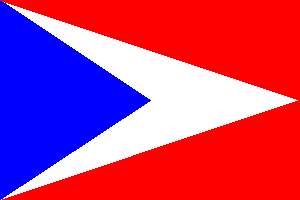 Vlajka České vexilologické společnosti